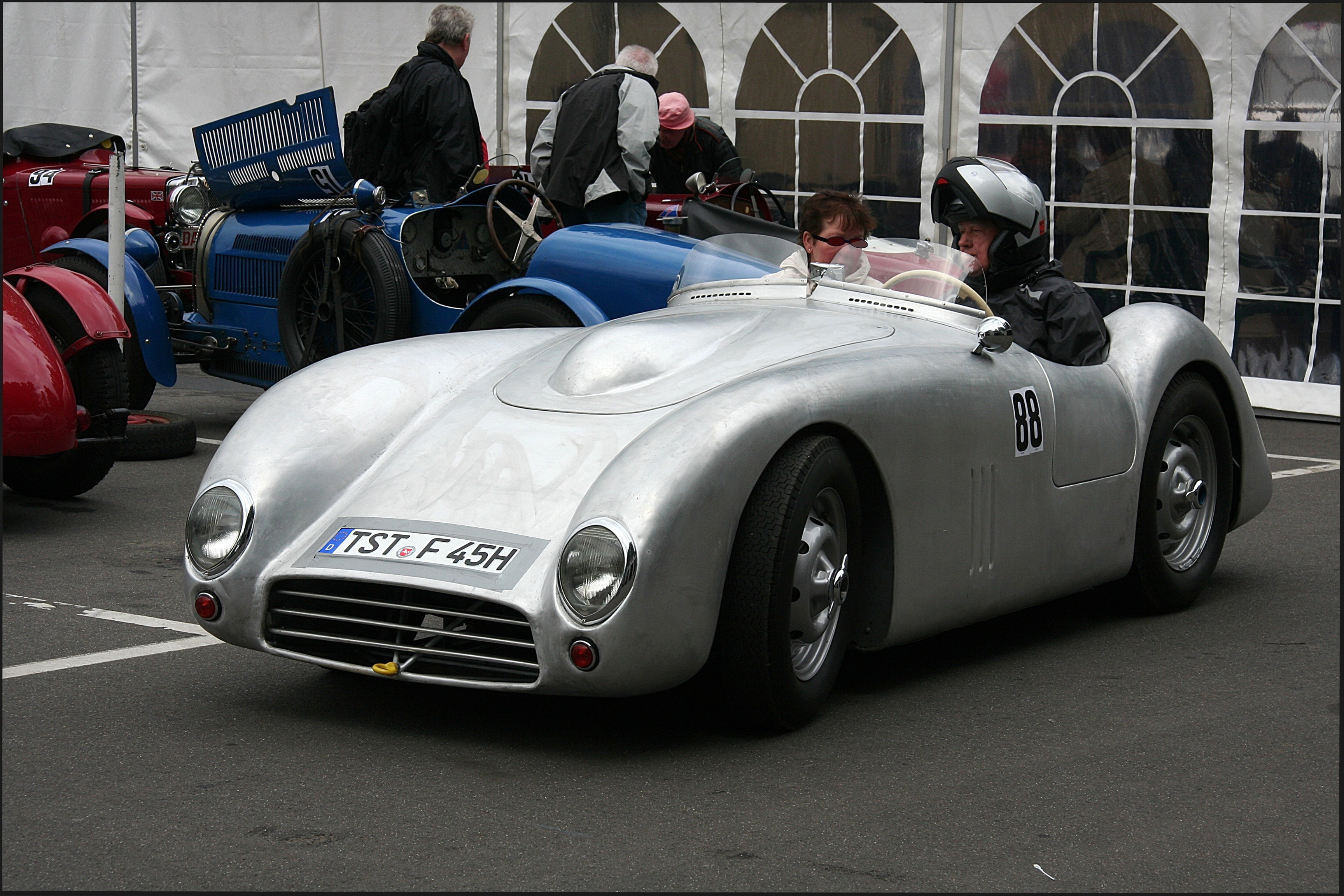 AFM 50, Baujahr 1950, beim Oldtimer Festival 2008 im historischen Fahrerlager des Nürburgrings